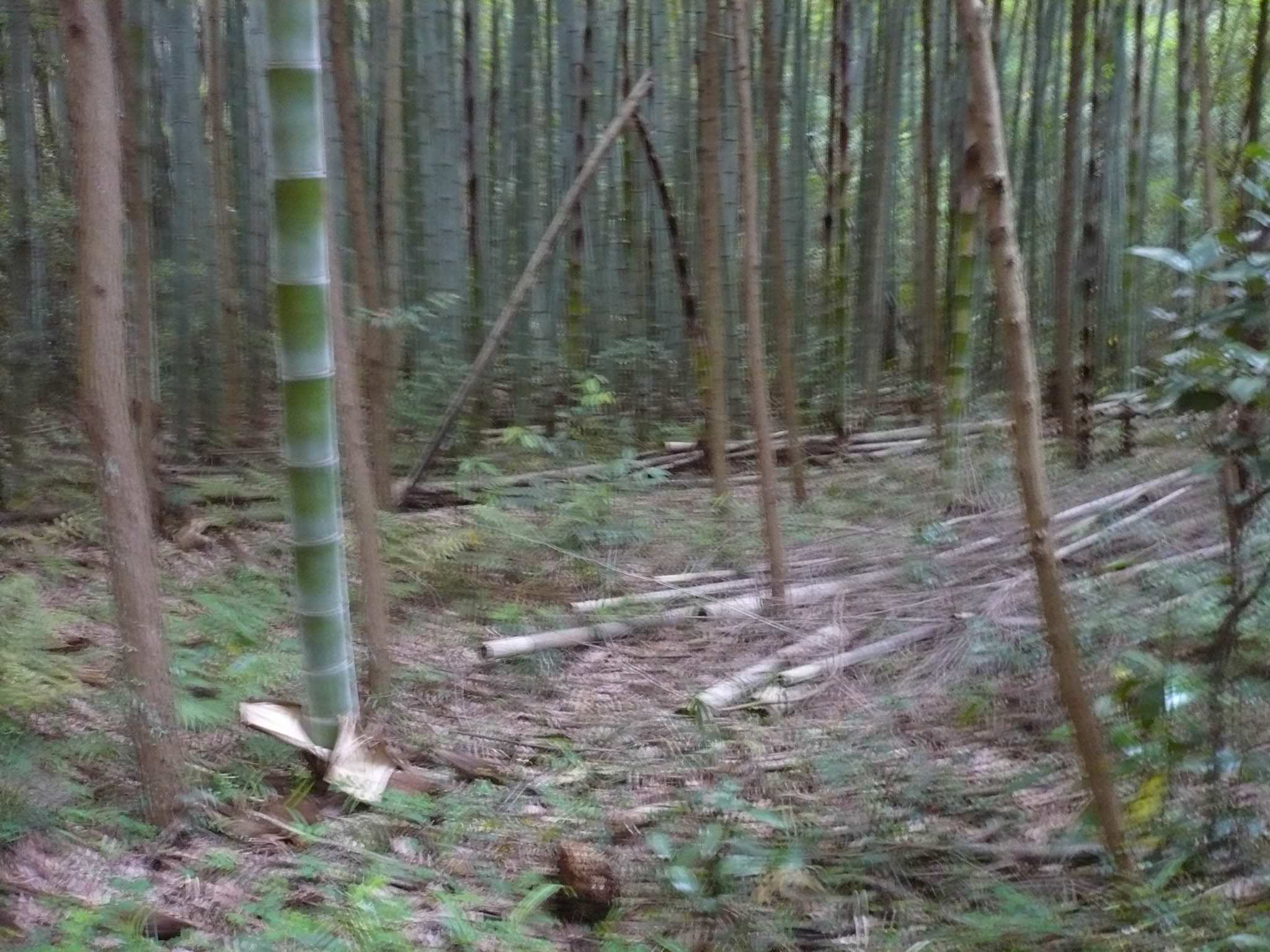 六角氏居館跡